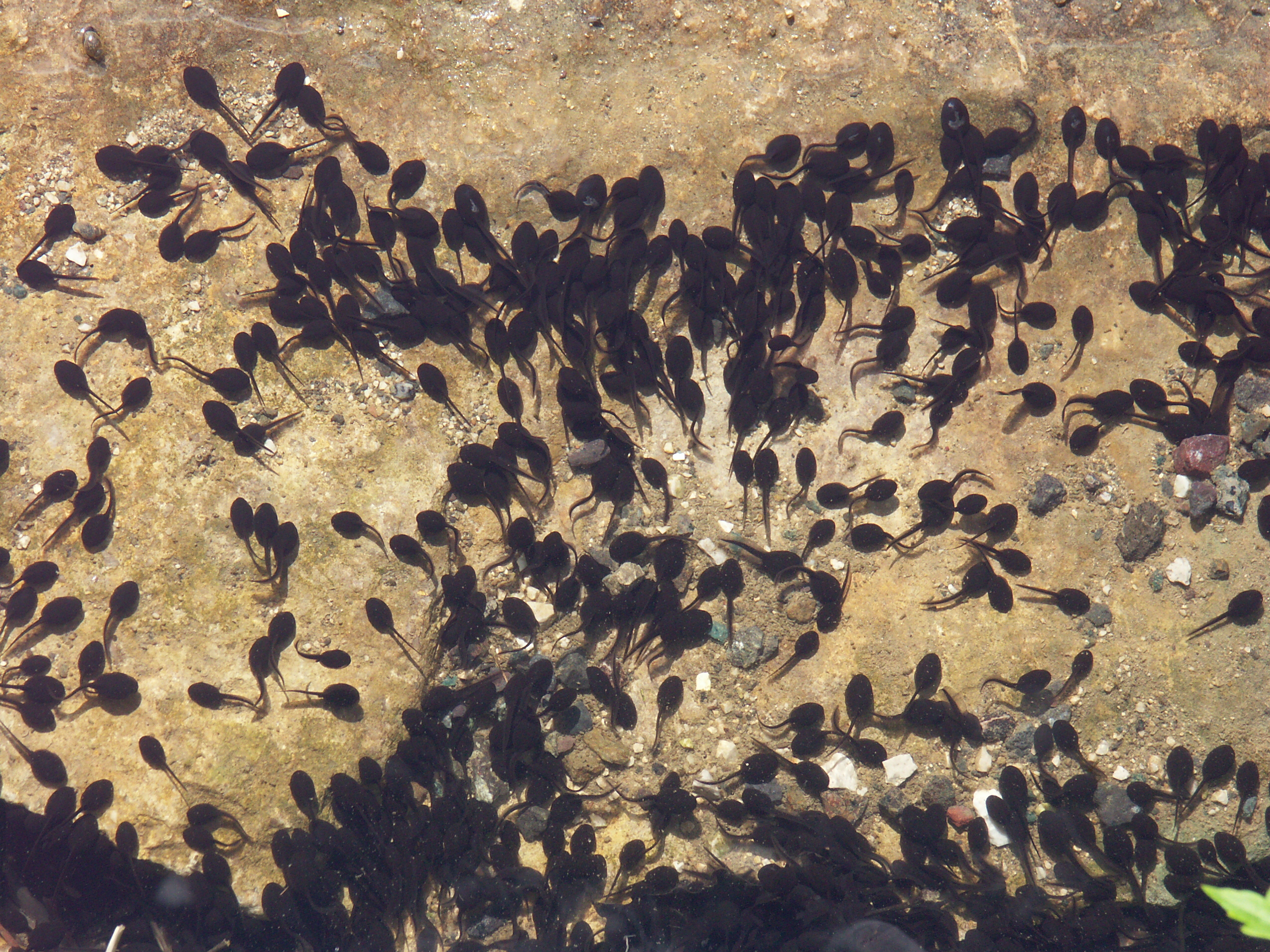 Author: Radovan Bahna, Slovak Republic, 2006